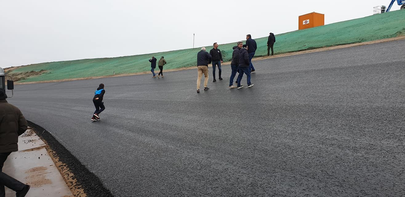 Arie Luyendijkkurve während der Umbaumaßnahme 2020 in Zandvoort